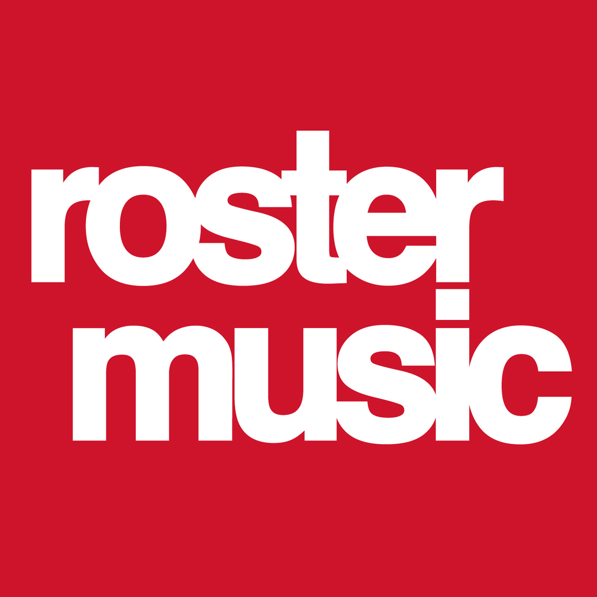 Logo Roster Music